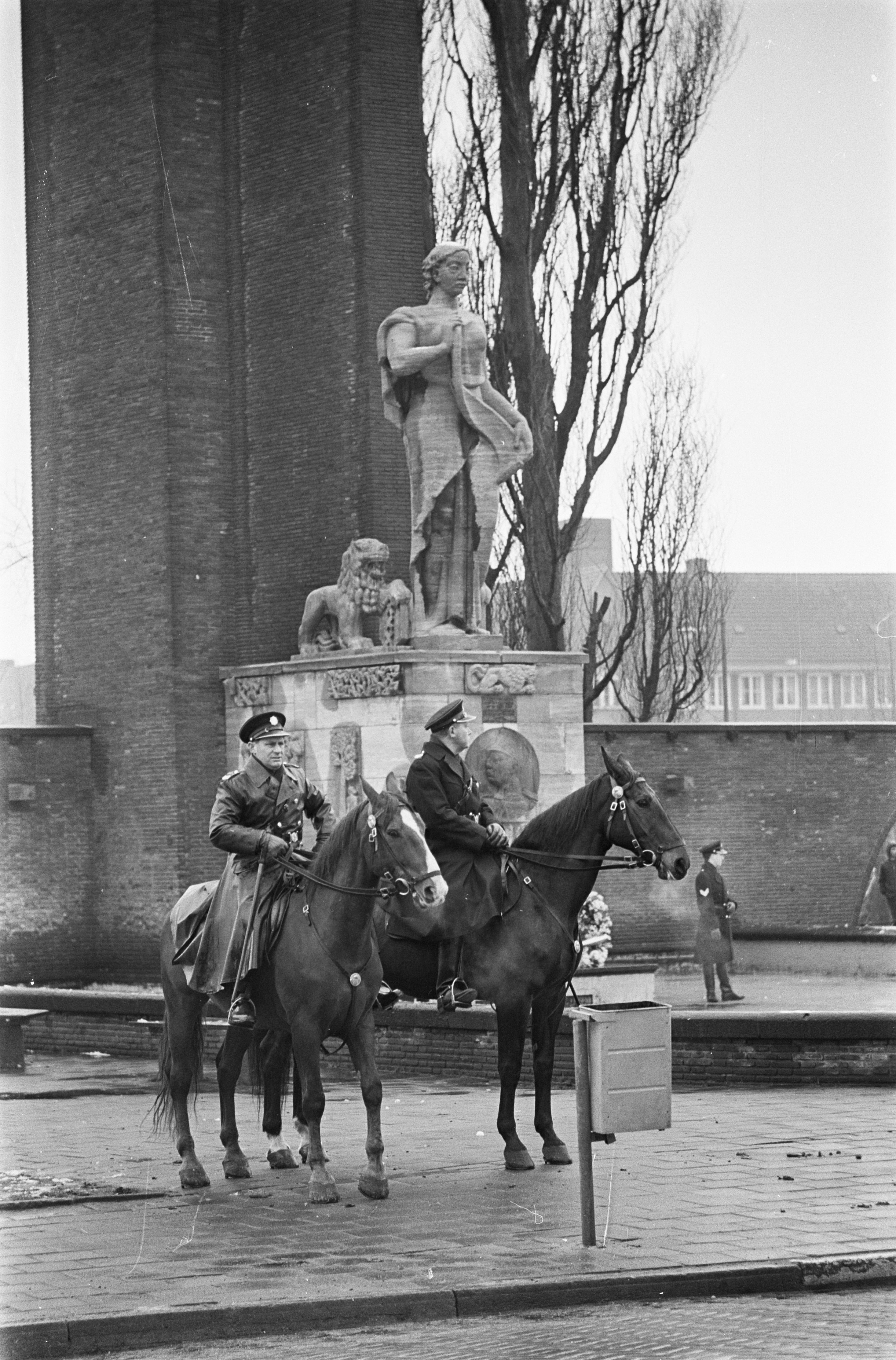 Collectie / Archief : Fotocollectie Anefo Reportage / Serie : [ onbekend ] Beschrijving : Amsterdam. In verband met een kranslegging bij het Van Heutsz-monument bewaren politieagenten te paard de orde Datum : 3 februari 1968 Locatie : Amsterdam, Noord-Holland Trefwoorden : beeldhouwwerken, gedenktekens, geschiedenis, kolonialisme, kransleggingen, orde, overzeese gebiedsdelen, politieagenten, ruiters Persoonsnaam : Heutsz, J.B. van Instellingsnaam : Van Hertz monument Fotograaf : Nijs, Jac. de / Anefo, [onbekend] Auteursrechthebbende : Nationaal Archief Materiaalsoort : Negatief (zwart/wit) Nummer archiefinventaris : bekijk toegang 2.24.01.05 Bestanddeelnummer : 921-0451